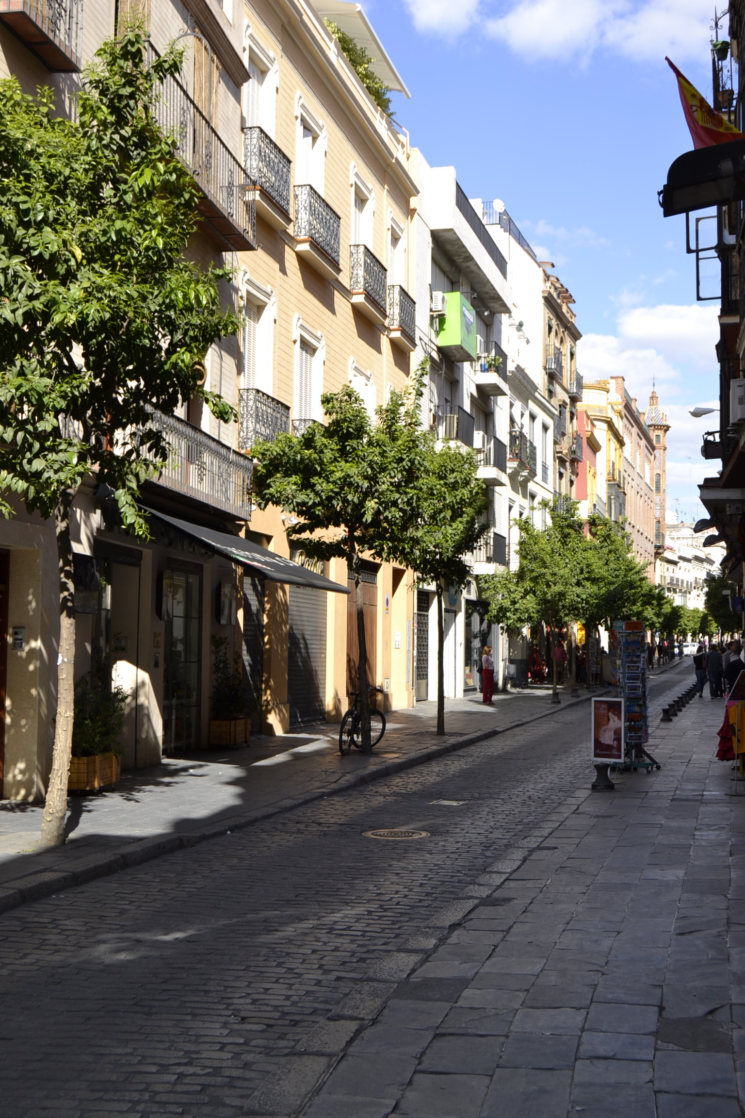 Calle García de Vinuesa, barrio de El Arenal. Sevilla, marzo de 2012